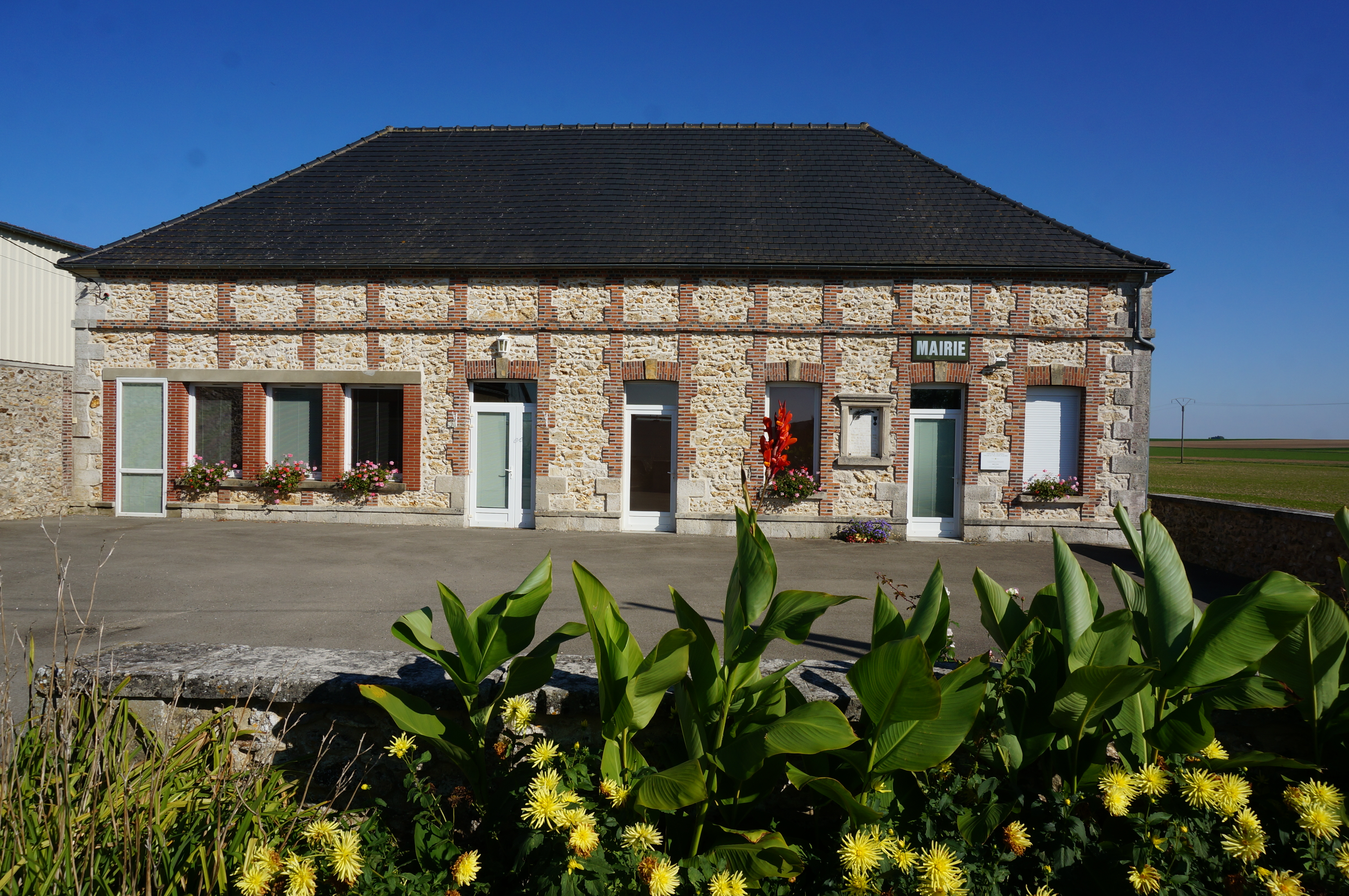 dans le village de Reuves, cf le titre.